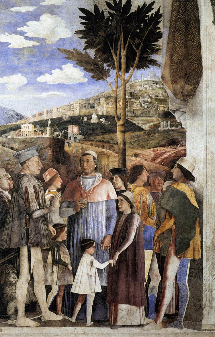 Camera picta, l'incontro 01.1